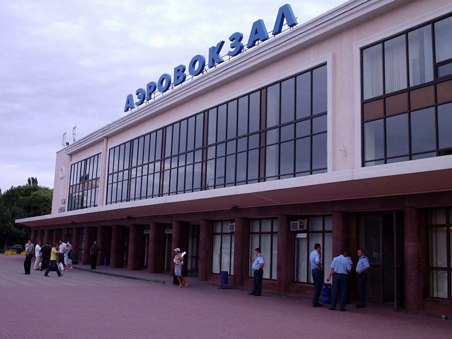 Odessa Airport Terminal